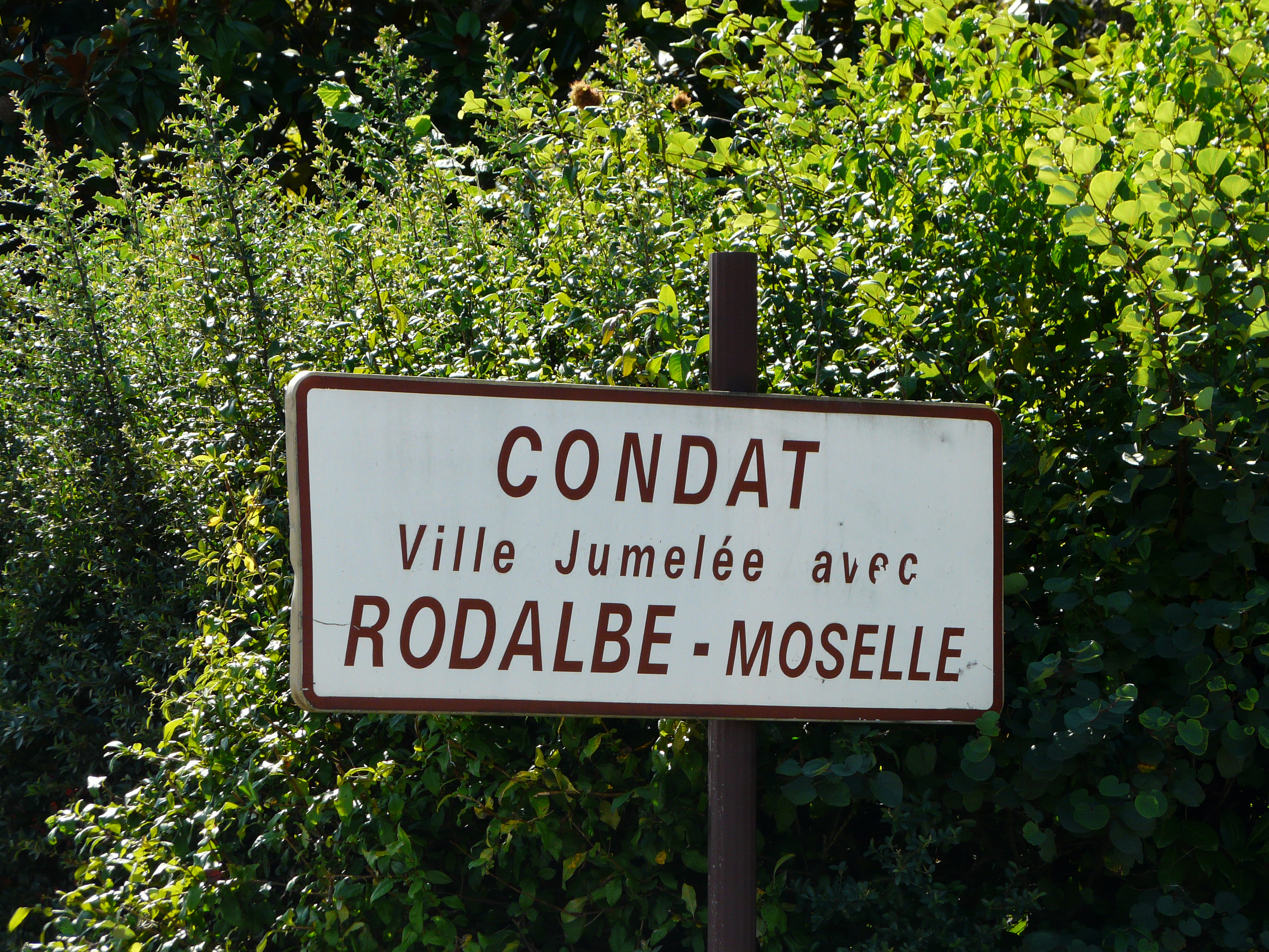 Panneau de jumelage de Condat-sur-Vézère, Dordogne, France.